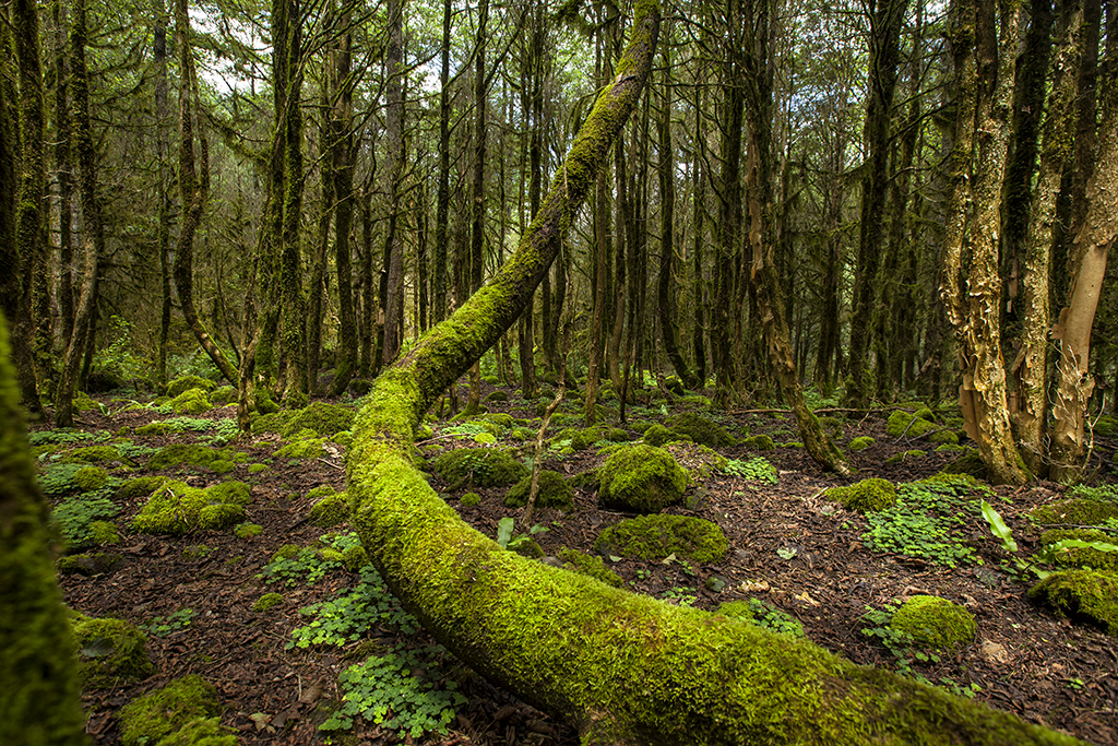 Türkiye'de Şimşir ağaçlarını orman oluşturduğu hatta ormanın üst tabakasını oluşturabildiği tek yer Karadeniz bölgesi Fırtına Vadisidir. Kaşık, tarak ve mekik gibi gereçlerin yapımında kullanıldığı için şimşirler, tarih boyunca insanlar tarafından kesilerek şimşir orman dokusu da yıkıma uğradı. Karadeniz kıyı bölgesindeki ormanlarda doğal olarak yetişen şimşirlerin ağaç boyutlarına ulaşanları yok edildiğinden, günümüzde ormanlardaki şimşirlerin büyük çoğunluğu çalı boyutlarında görülüyor. Bu toplu yıkımdan en az etkilenmiş olan ve günümüzde büyük boyutlu şimşirlerin orman oluşturabildiği tek yer Çamlıhemşin ormanlarıdır. Uzmanlara göre, 20-30 cm çapa, 8-10 m boya ulaşabilmiş şimşirlerin saf olarak veya kızılağaç, kayın, ladin gibi ağaç türleriyle karışık orman oluşturması bilimsel, genetik ve toplum kültürü yönünden son derece önemlidir. Şimşir ağaçlarının üst yüzü koyu yeşil, alt yüzü açık yeşil renkli, yaprakları serttir. Gölgeye dayanıklı olduğundan yüksek ağaçların altında da yaşamını sürdürebilir. Sürgün verme yeteneği nedeniyle park ve bahçelerde makasla budanarak istenen biçimler verilebilir. Saf bir orman oluşturabildiği gibi kayın, Gürgen, Ladin, kızılağaç, Köknar ve Akçaağaçlarla birlikte karışık orman da kurabilir. Şubat-mart aylarında açan çiçekleri sarı renkli, içinde altı tane tohum taşıyan meyveleri kapsül biçimindedir. Çamlıhemşin çevresindeki şimşirler genellikle ana dere kıyılarında, yan derelerin iç kısımlarında, altlarında su bulunan taşlık yerlerde ve sızıntı suların bulunduğu kaya çatlaklarında yetişir.